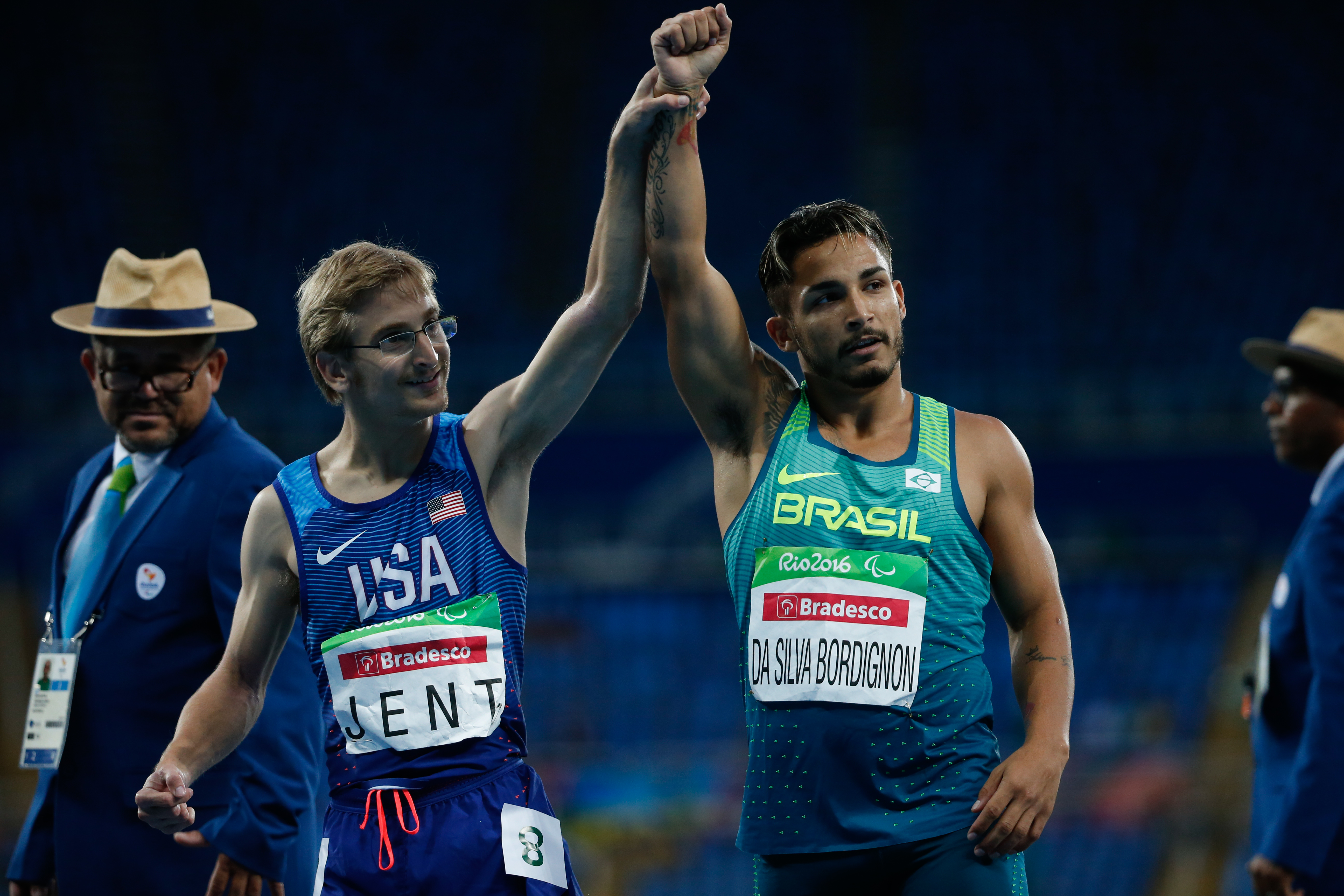 Rio de Janeiro - Brasileiro Fabio da Silva Bordignon ganha a medalha de prata nos 100m T35 nos Jogos Paralímpicos Rio 2016, no Estádio Olímpico (Fernando Frazão/Agência Brasil)